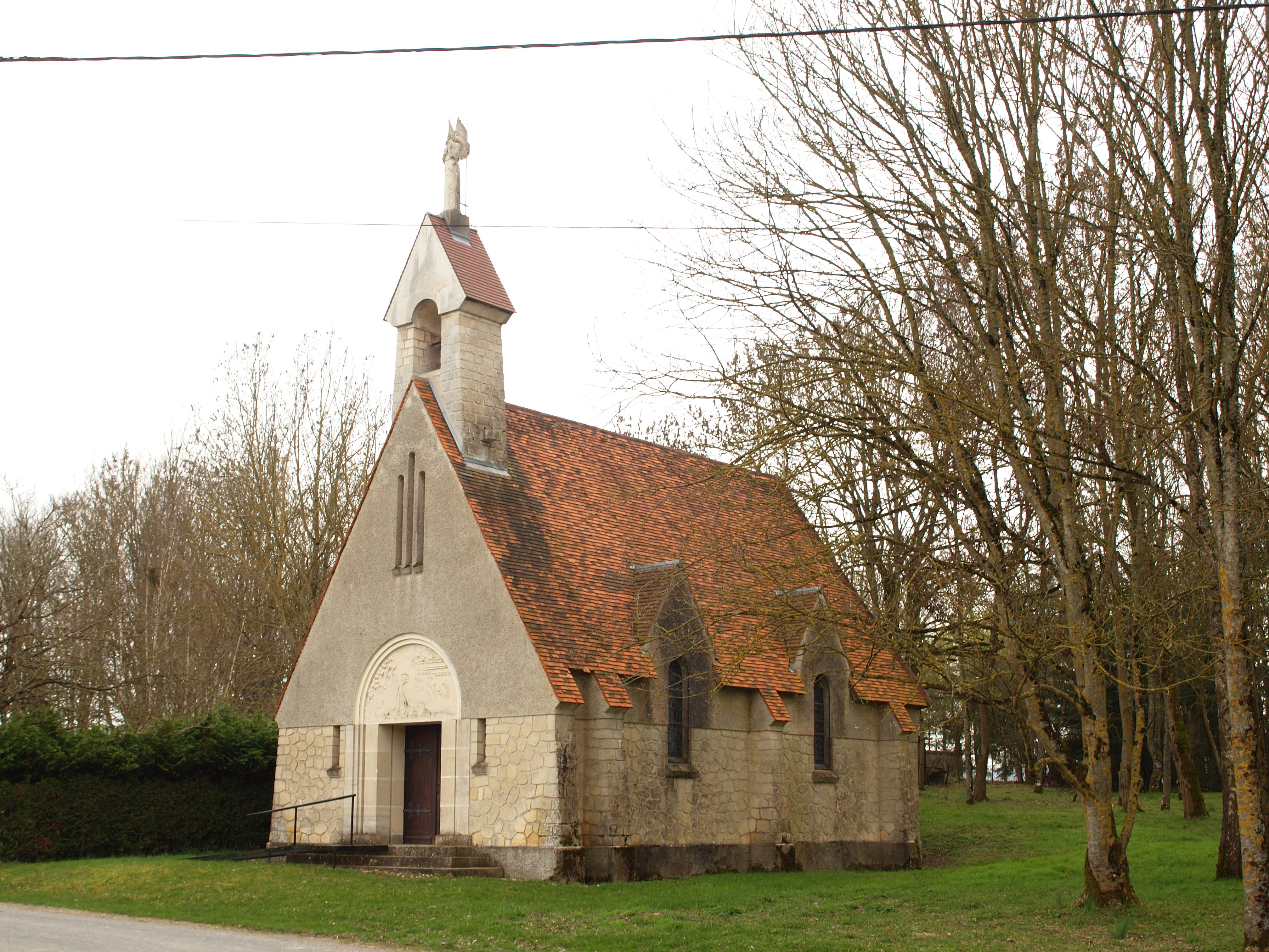 Rouvroy-Ripont (Marne, France)